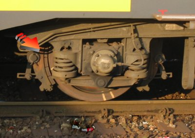 Remblokken Mat64 trein, Alphen aan den Rijn, september 2003, eigen foto